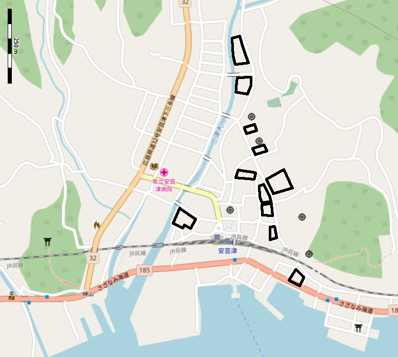 2018年の地図に大正期から昭和期にかけて広島県東広島市安芸津町三津にあった酒造場を示したもの This map may be incomplete, and may contain errors. Don't rely solely on it for navigation.